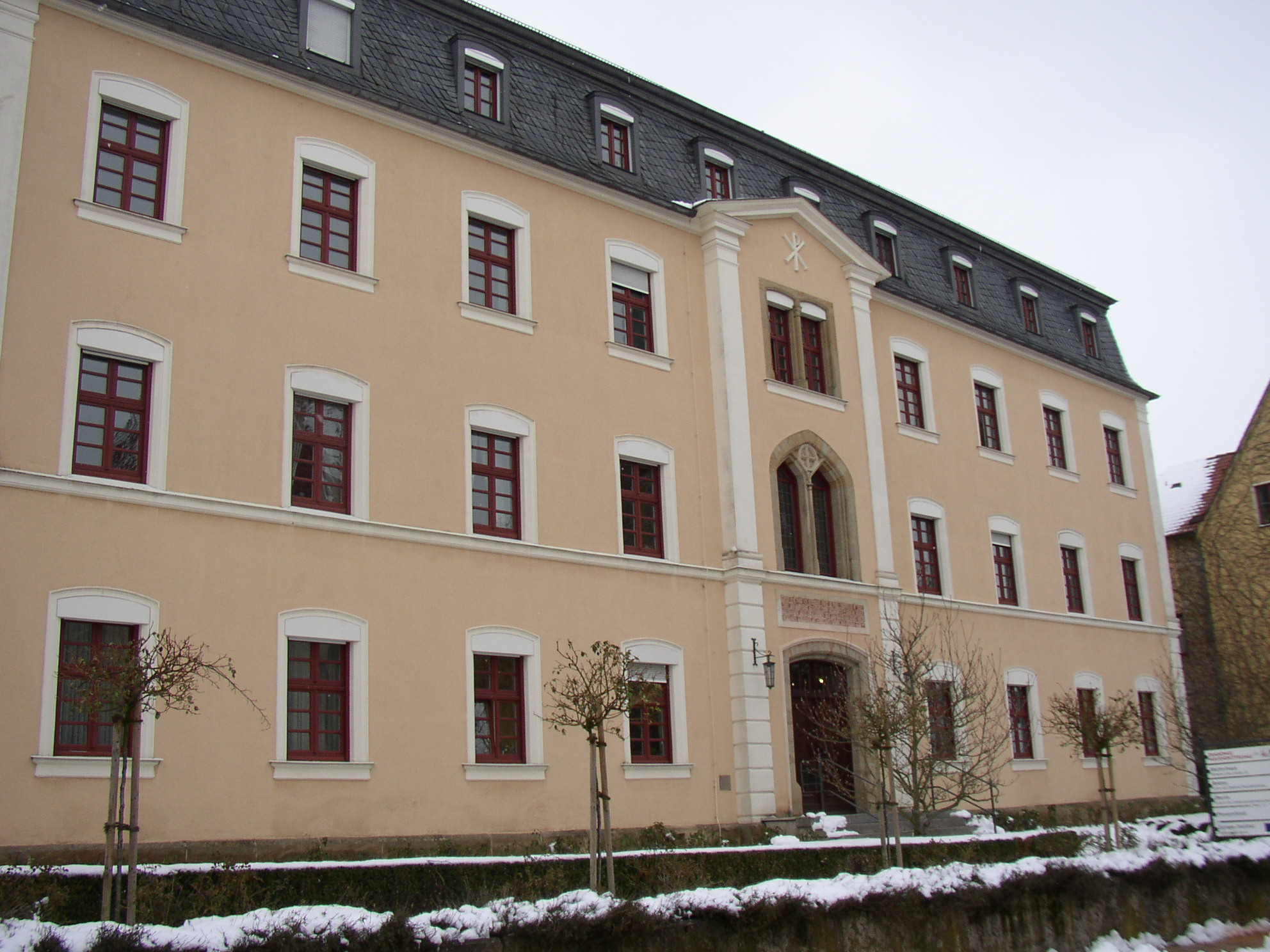 Diakonissenmutterhaus in Neuendettelsau